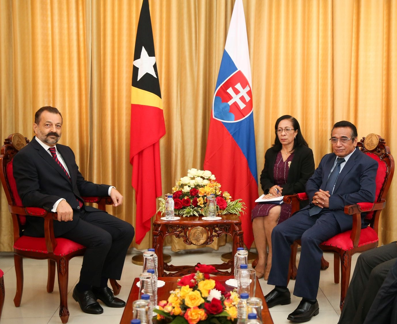 Jaroslav Chlebo übergibt seine Akkreditierung als Botschafter der Slowakei an Osttimors Staatspräsident Francisco Guterres.